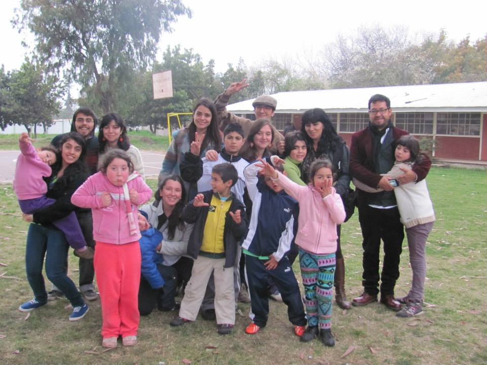 Foto Recrea con Jairo Buitrago